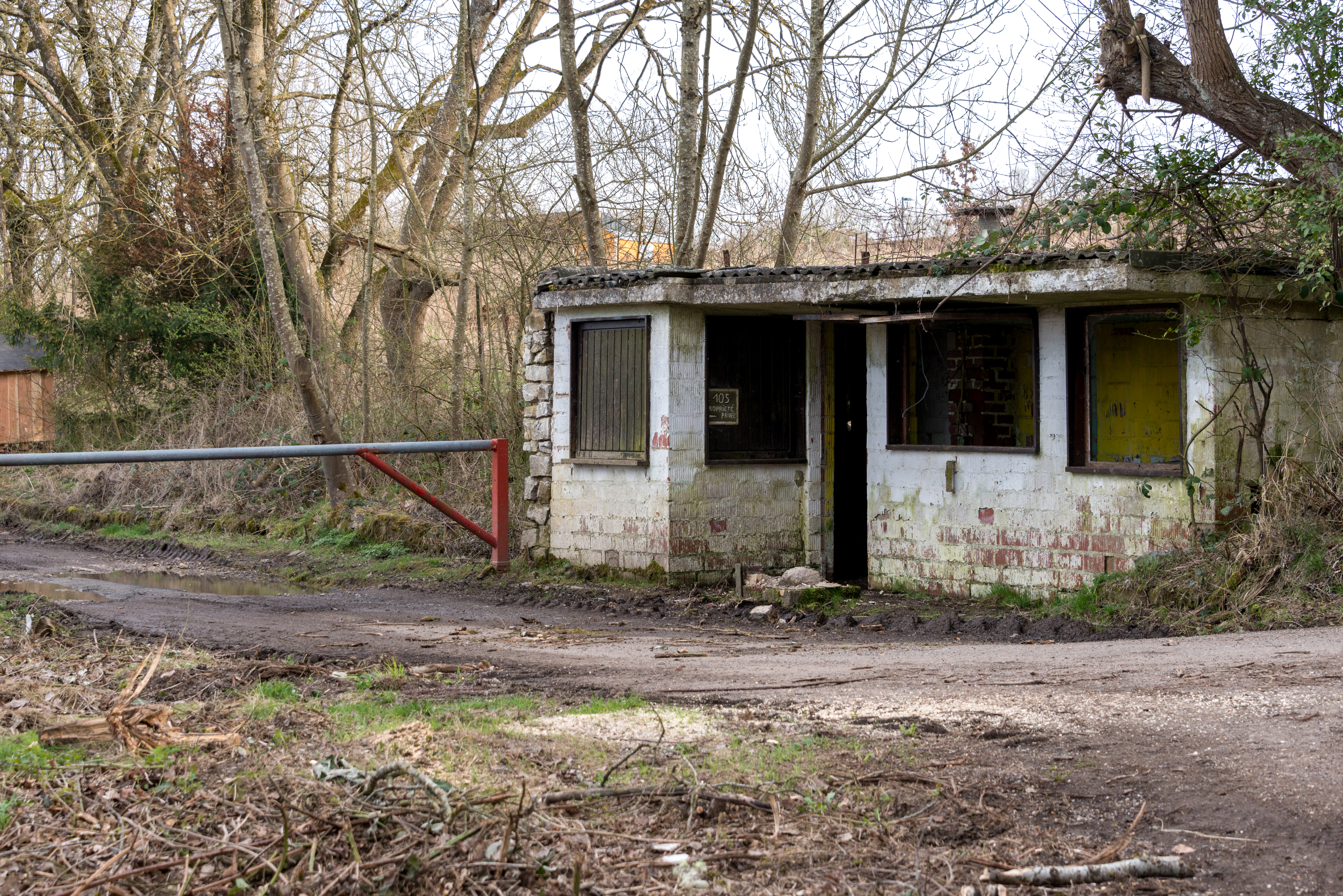 Mäerz 2017, Impressiounen am fréiere Sennenger Zoo.